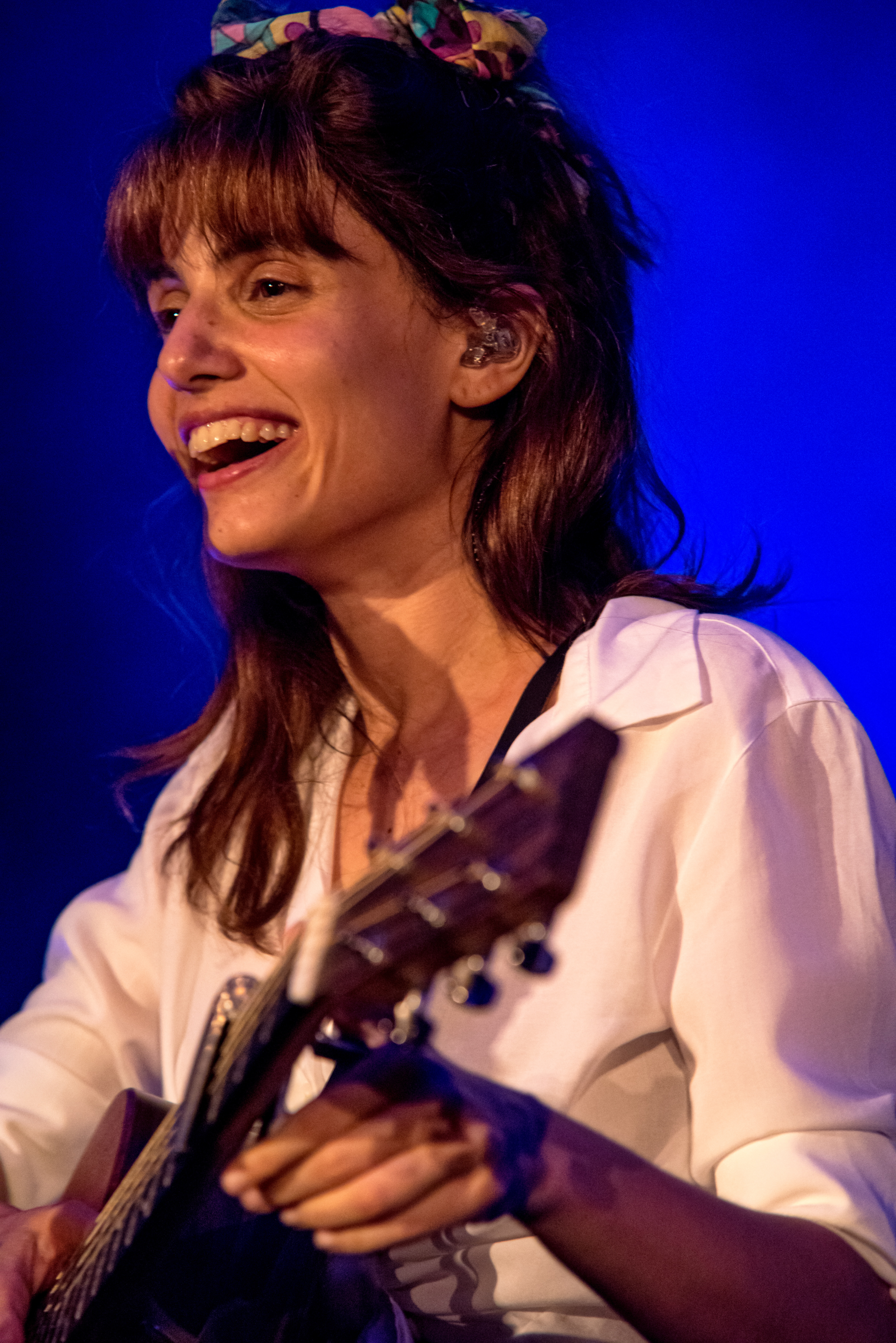 Bilder vom Zelt Musik Festival 2018 in Freiburg im Breisgau Lola Marsh am 1. August 2018 im Spiegelzelt